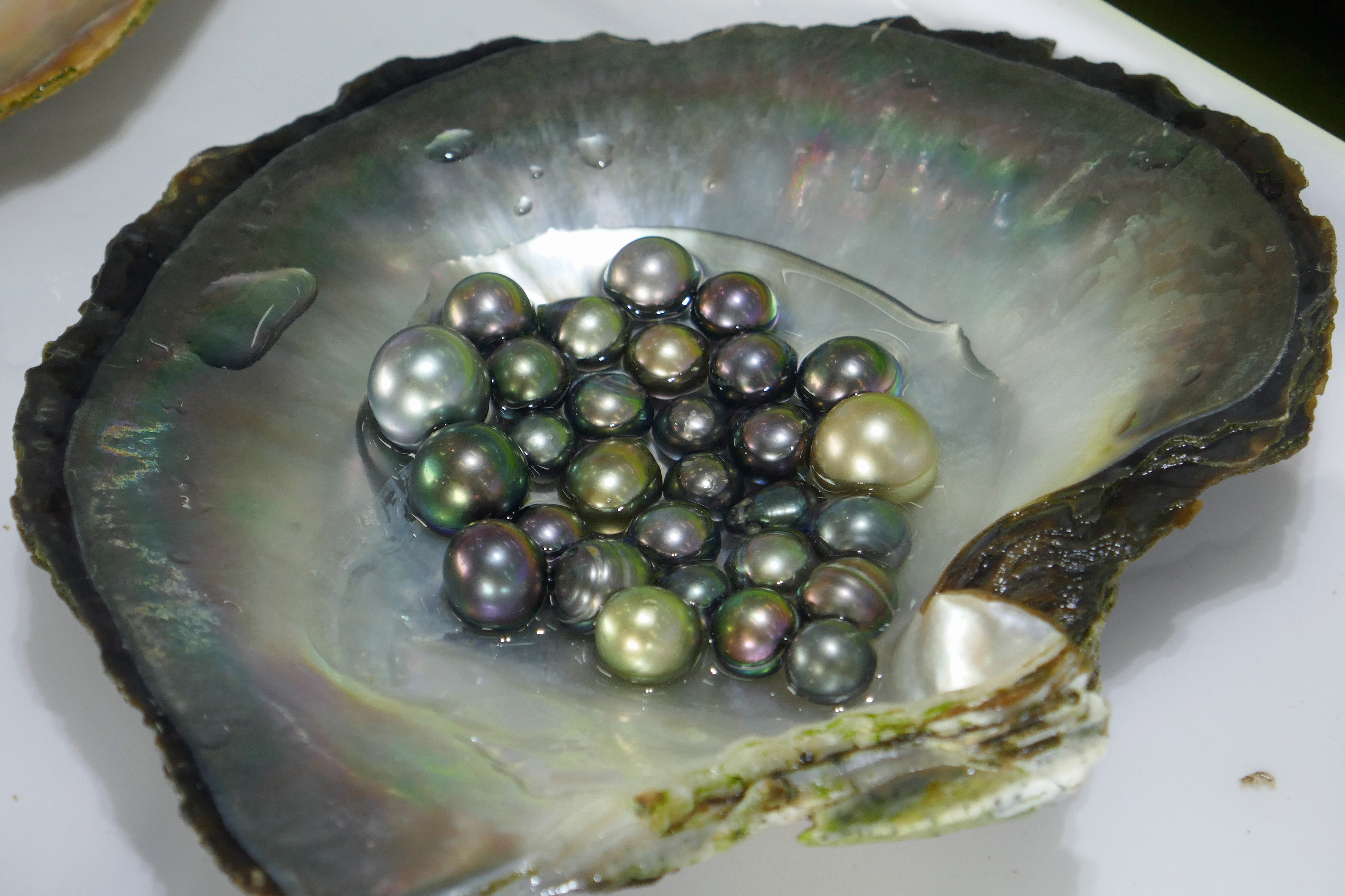 Pearl production in Halong Bay (Vietnam).